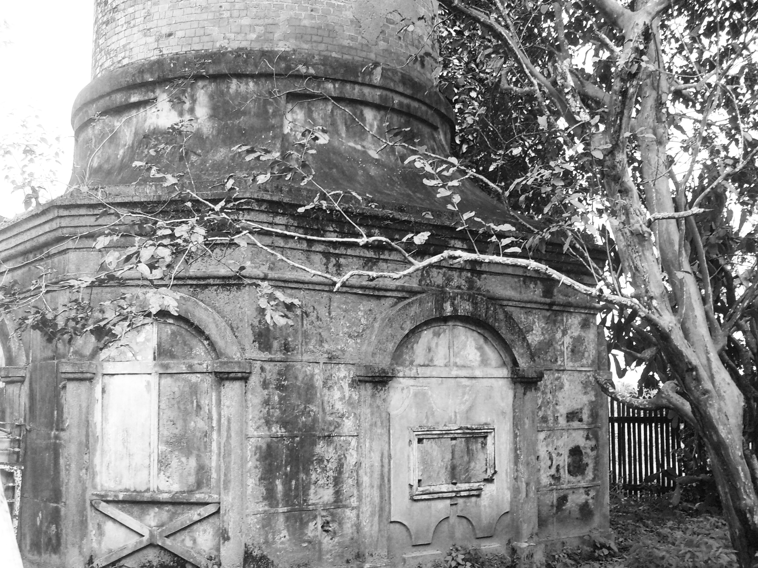 Imagem da base da chaminé do Engenho Central de Pojuca Fonte: Livro Pojuca: o Arraial da Passagem